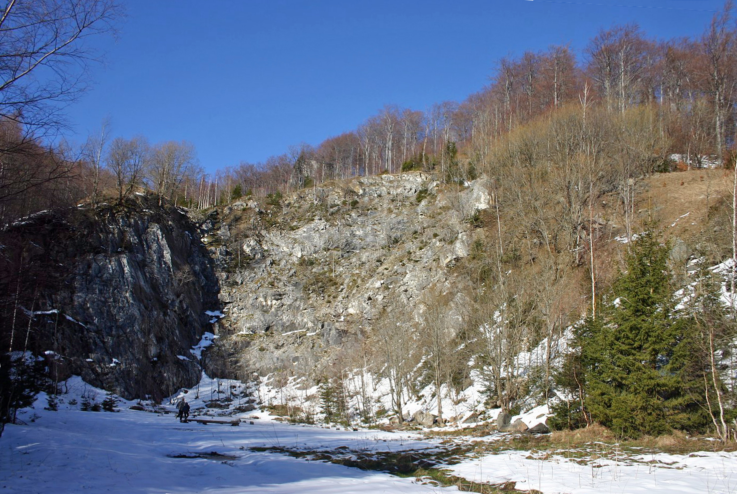 Wyrobisko nieczynnego kamieniołomu Kletno II na terenie rezerwatu Jaskinia Niedźwiedzia w Kletnie (gmina Stronie Śląskie, Dolny Śląsk)